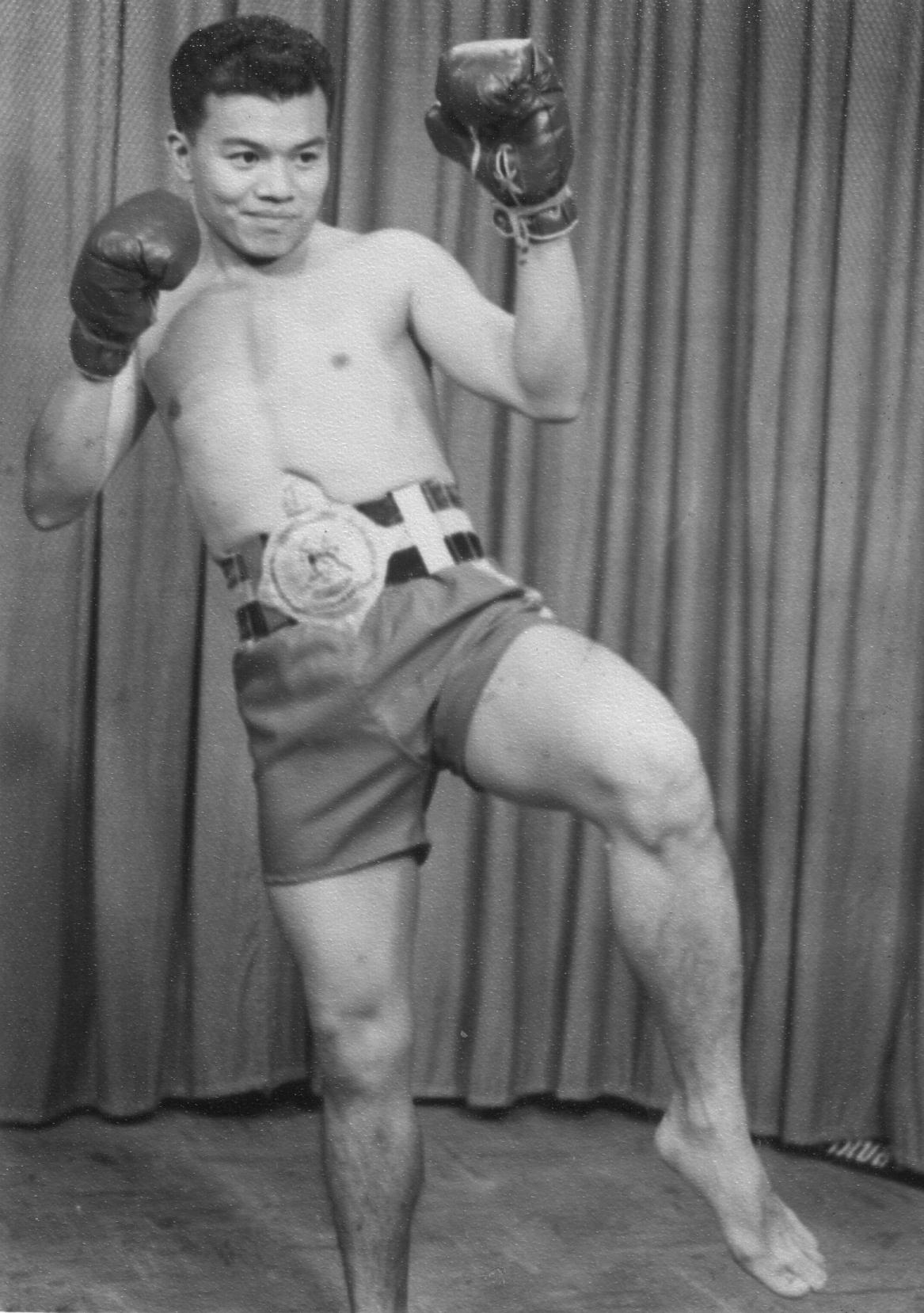 สมจินต์ ธรรมทัต ละคร เสือเก่า